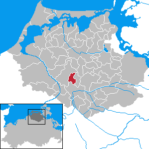 Hugoldsdorf in Mecklenburg-Vorpommern - District Nordvorpommern